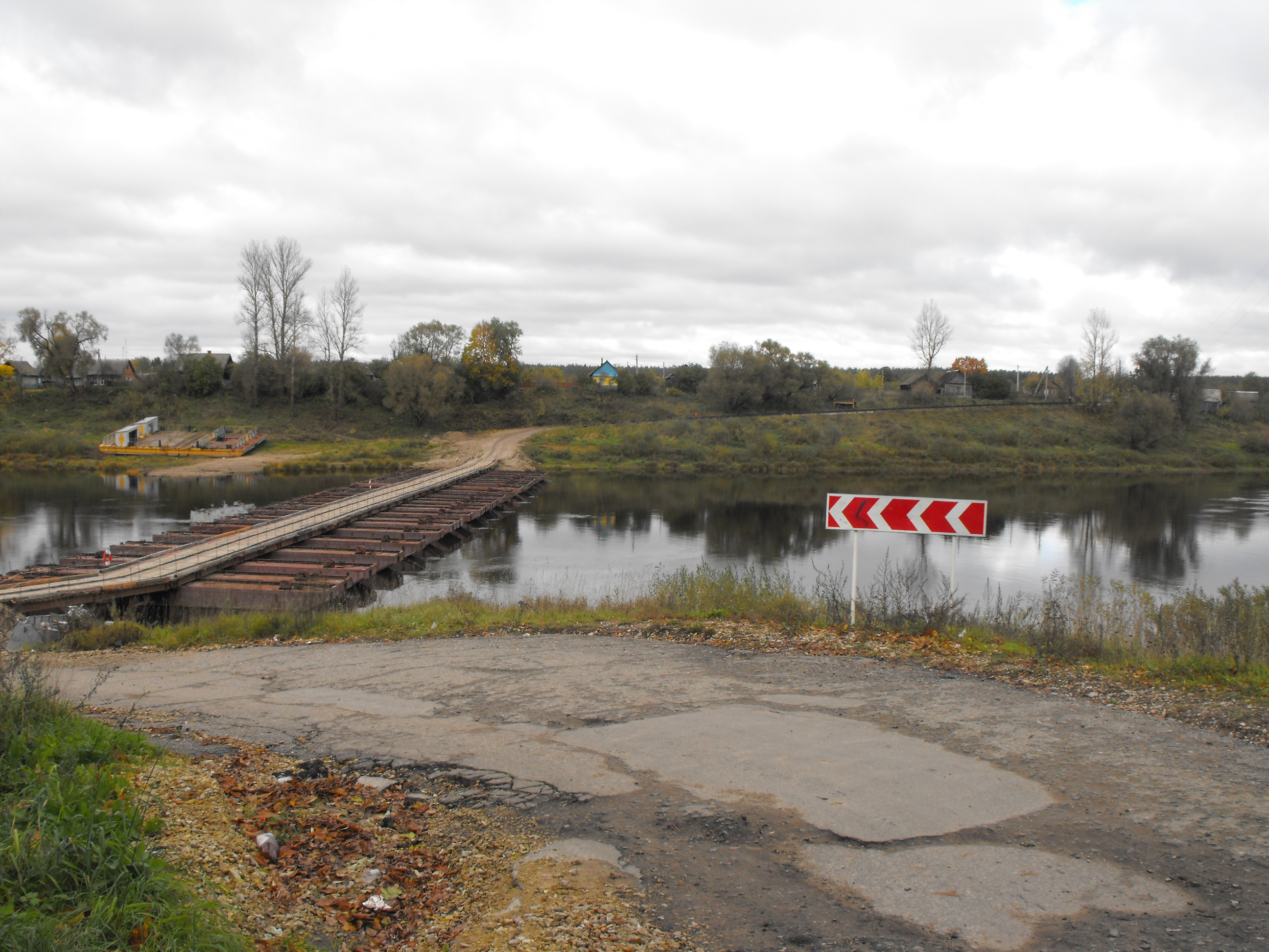 Вид со стороны Бешенковичей с улицы Советской на бывший посёлок Стрелка, где произошло массовое убийство евреев Бешенковичского гетто, и где установлен памятник погибшим